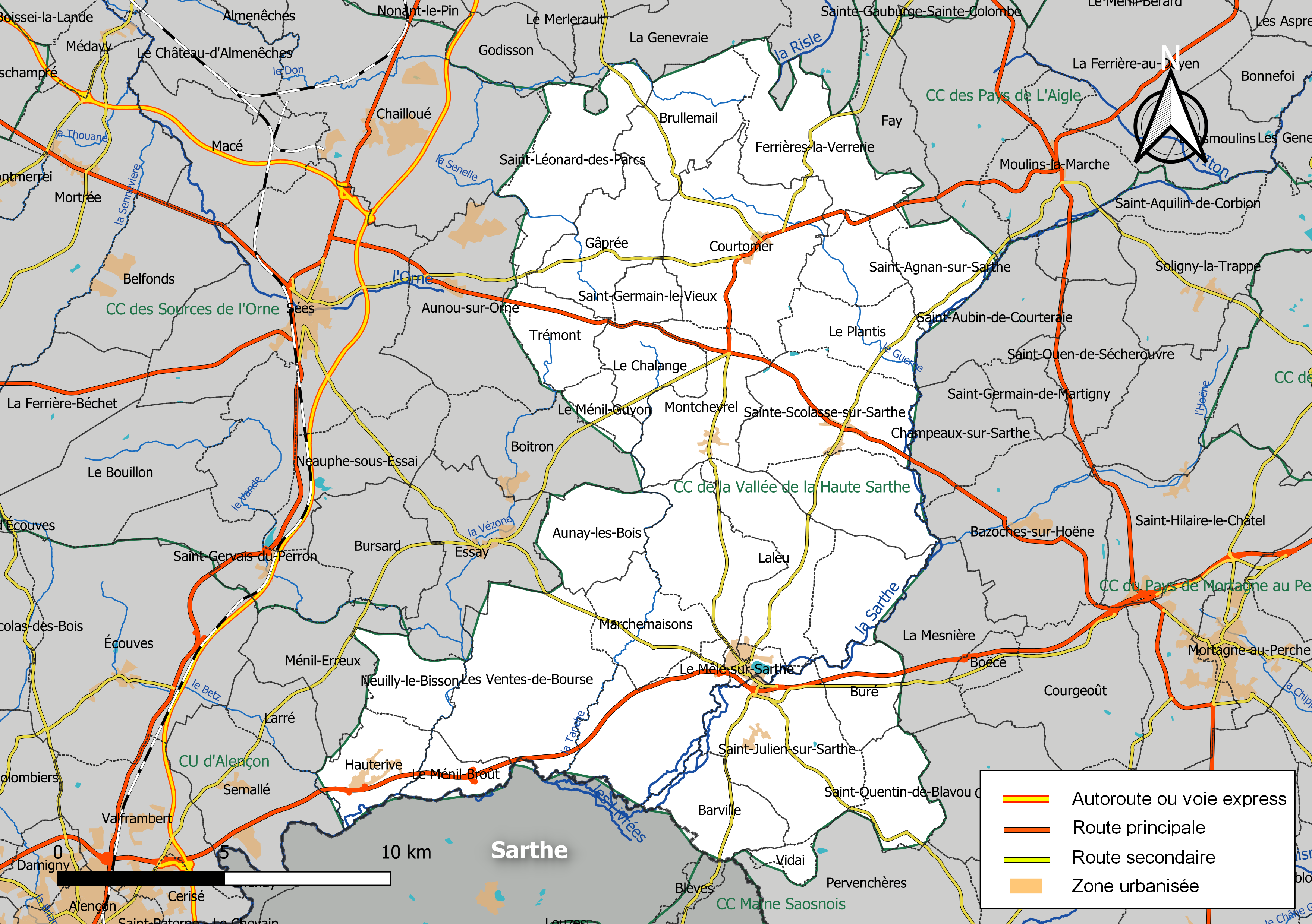 Carte géographique de la Communauté de communes de la Vallée de la Haute Sarthe, département de l'Orne, France. Composition au 1er janvier 2019.